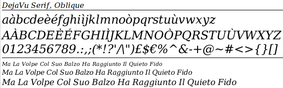 Campione del tipo di caratteri DejaVu Serif Oblique. La famiglia DejaVu è liberamente utilizzabile e modificabile. Categoria:Immagini esclusivamente in GNU FDL